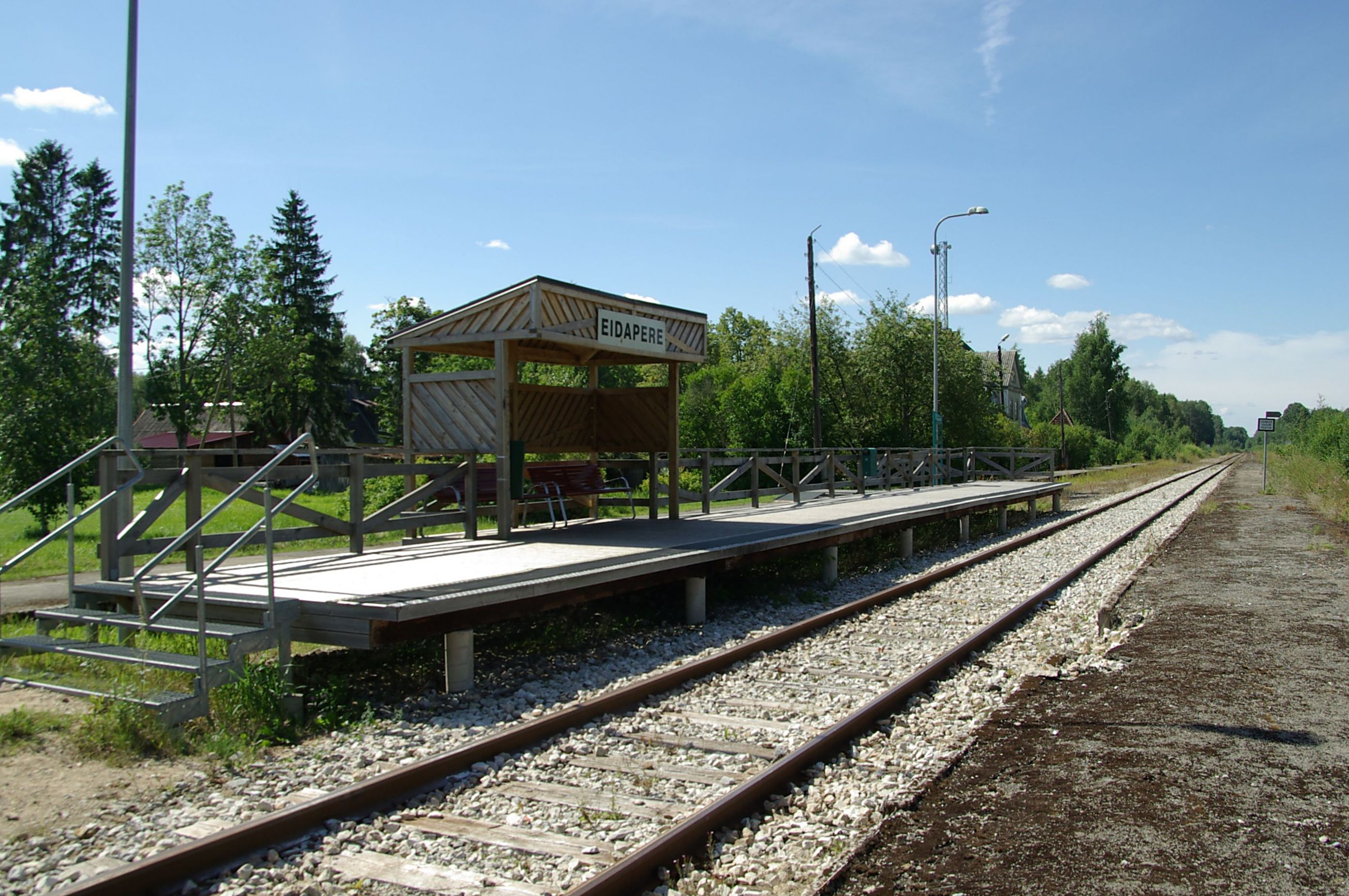 raudteepeatus Raplamaal Kehtna vallas Eidaperes